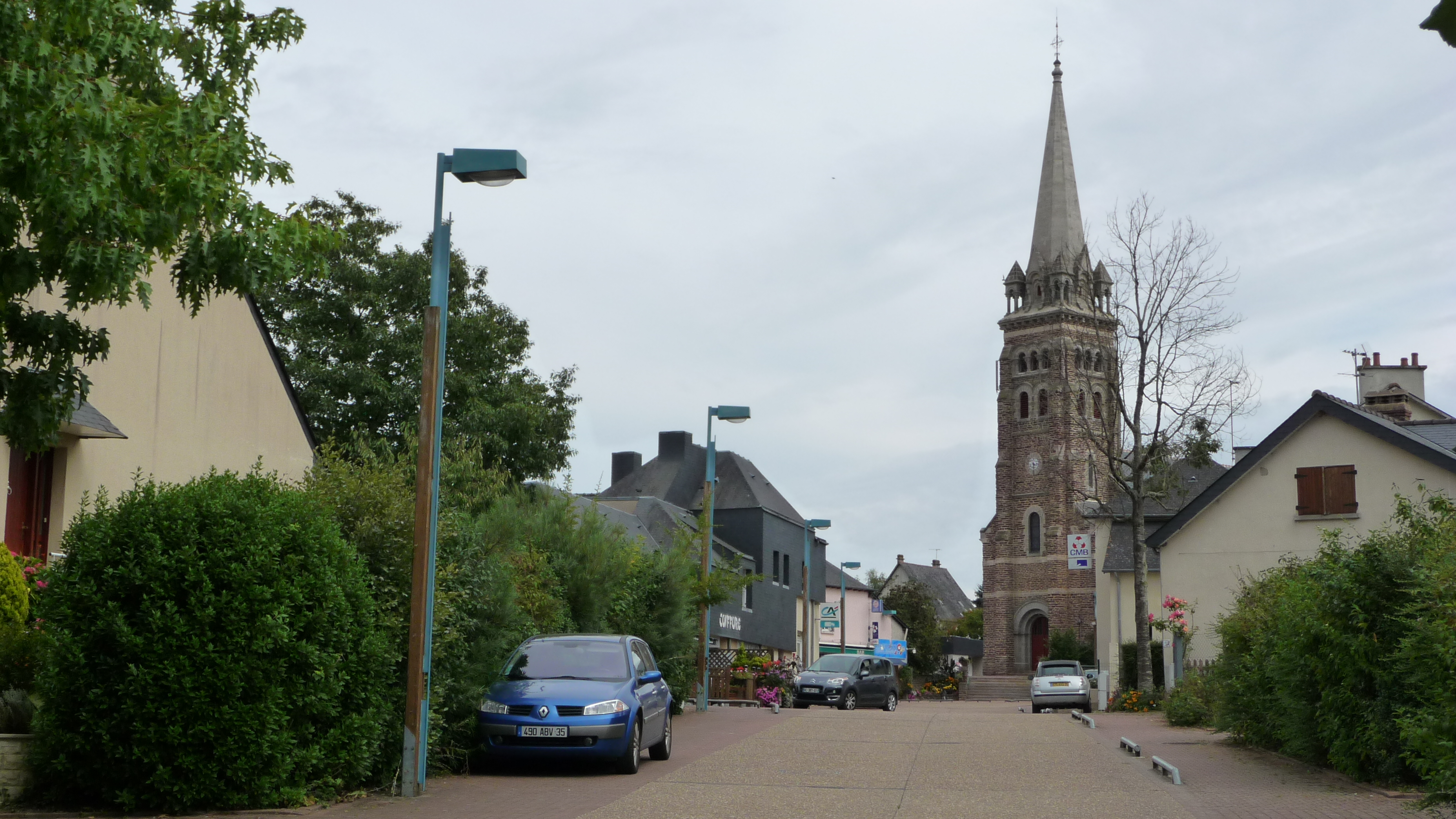 La Chapelle-des-Fougeretz : le centre